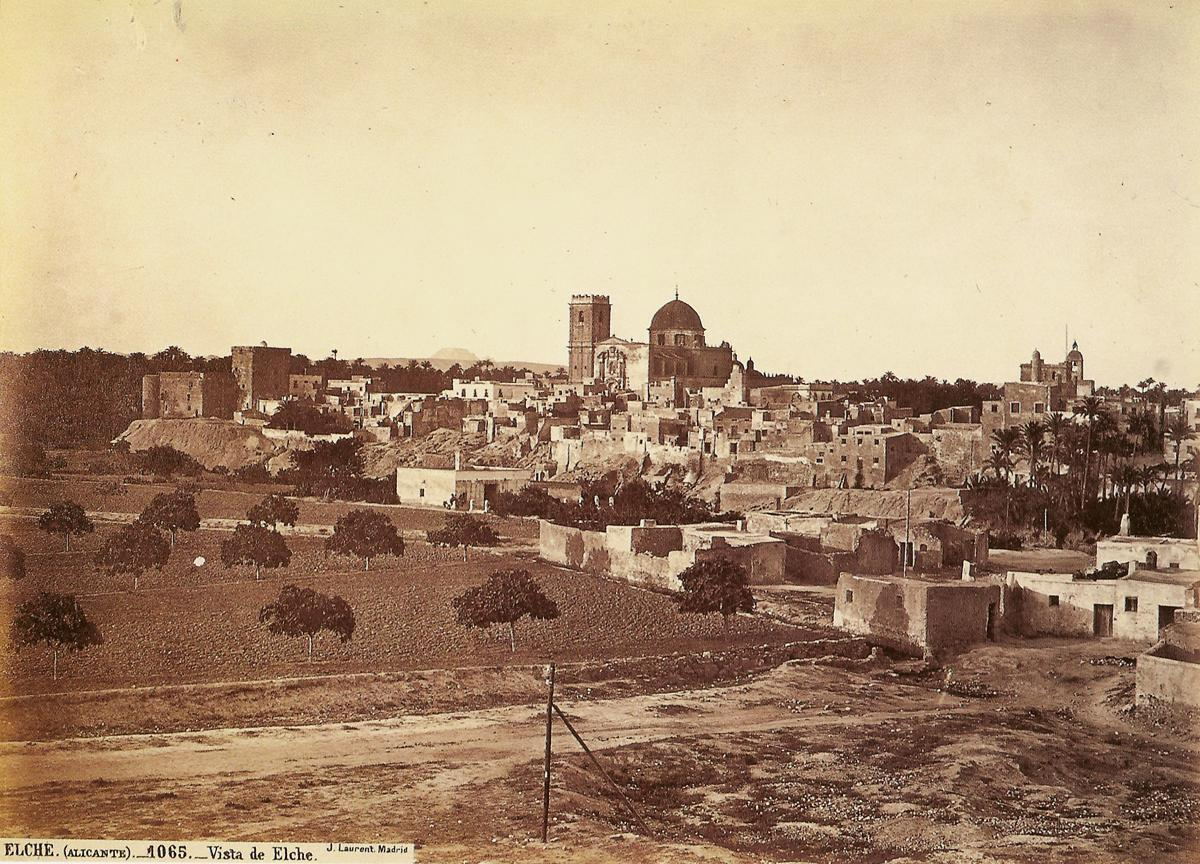 Vista de la ciutat d'Elx, J. Laurent.